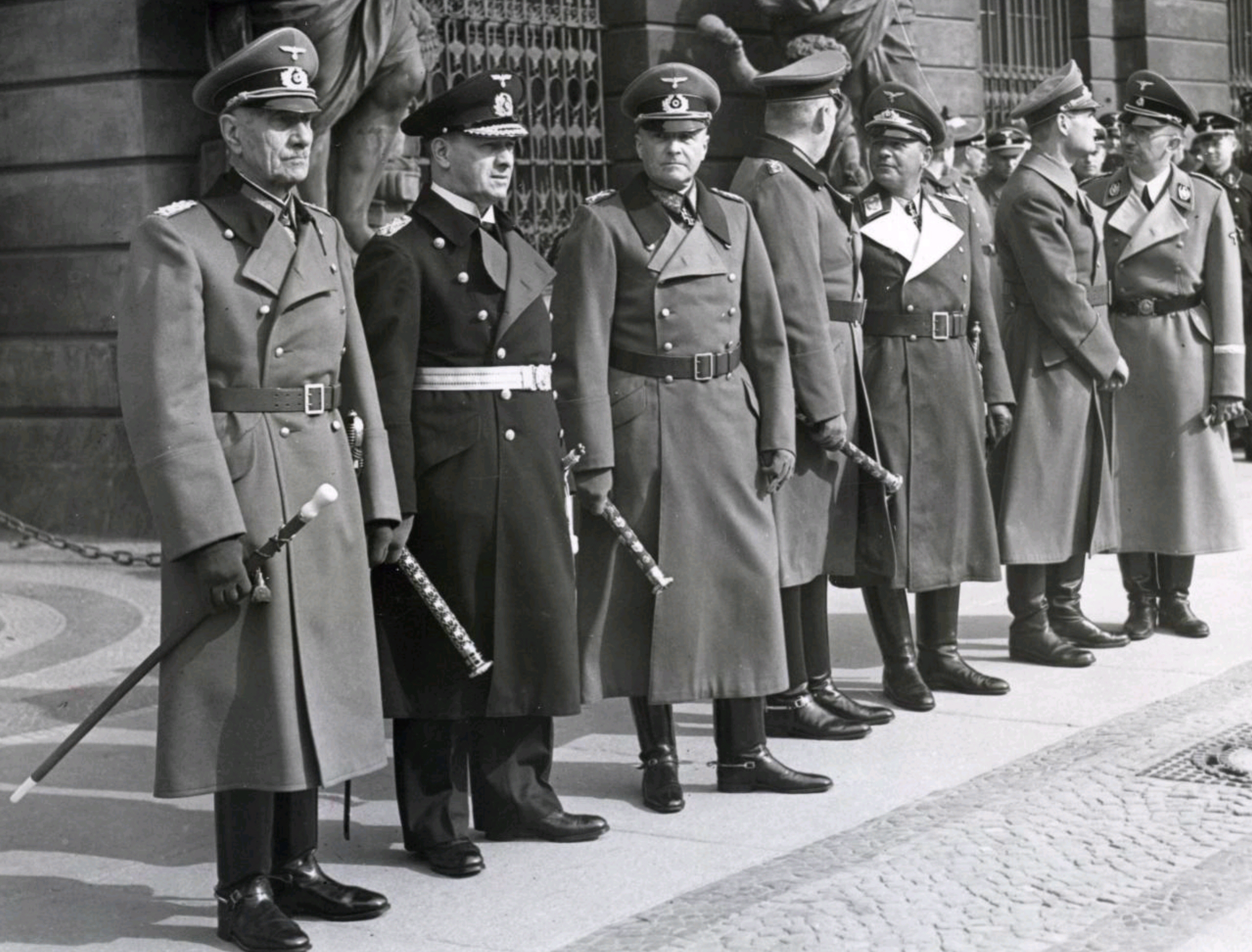 Tweede Wereldoorlog. Duitsland; Berlijn maart 1941.Bijeenkomst in het arsenaal in Berlijn om de gevallenen te herdenken. V.l.n.r. generaal veldmaarschalk von Böhm- Ermolli, admiraal Raeder, veldmaarschalk Walther Heinrich Hermann von Brauchitsch (1881-1948), generaal veldmaarschalk Wilhelm Keitel, generaal veldmaarschalk Milch, minister Rudolf Hess rijksführer SS Heinrich Himmler.